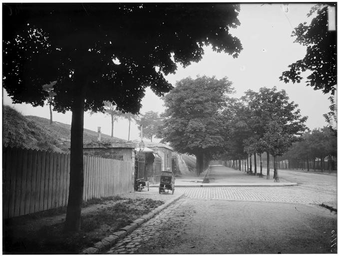 Porte